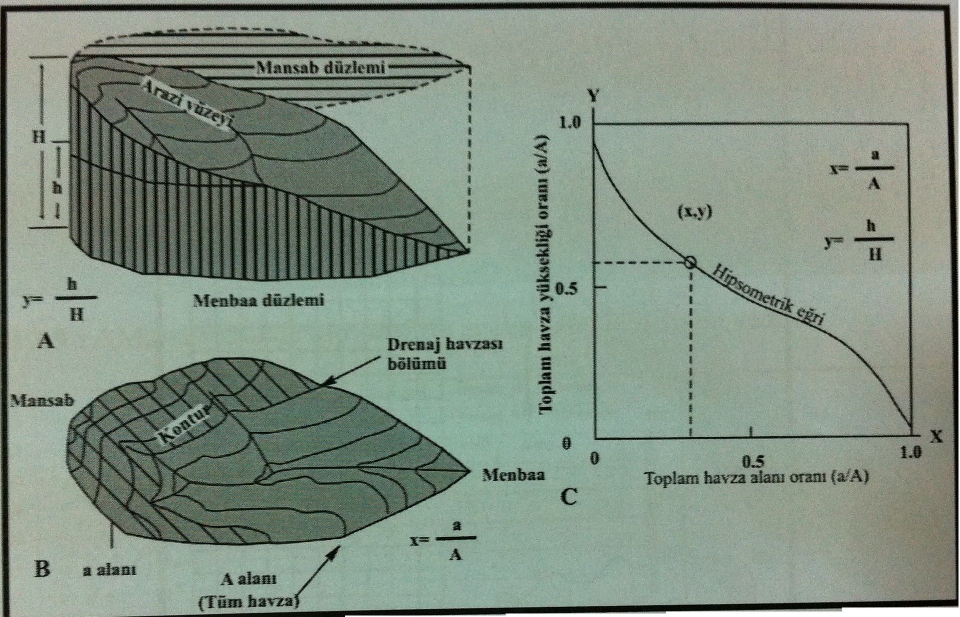 Hipsometrik Eğri